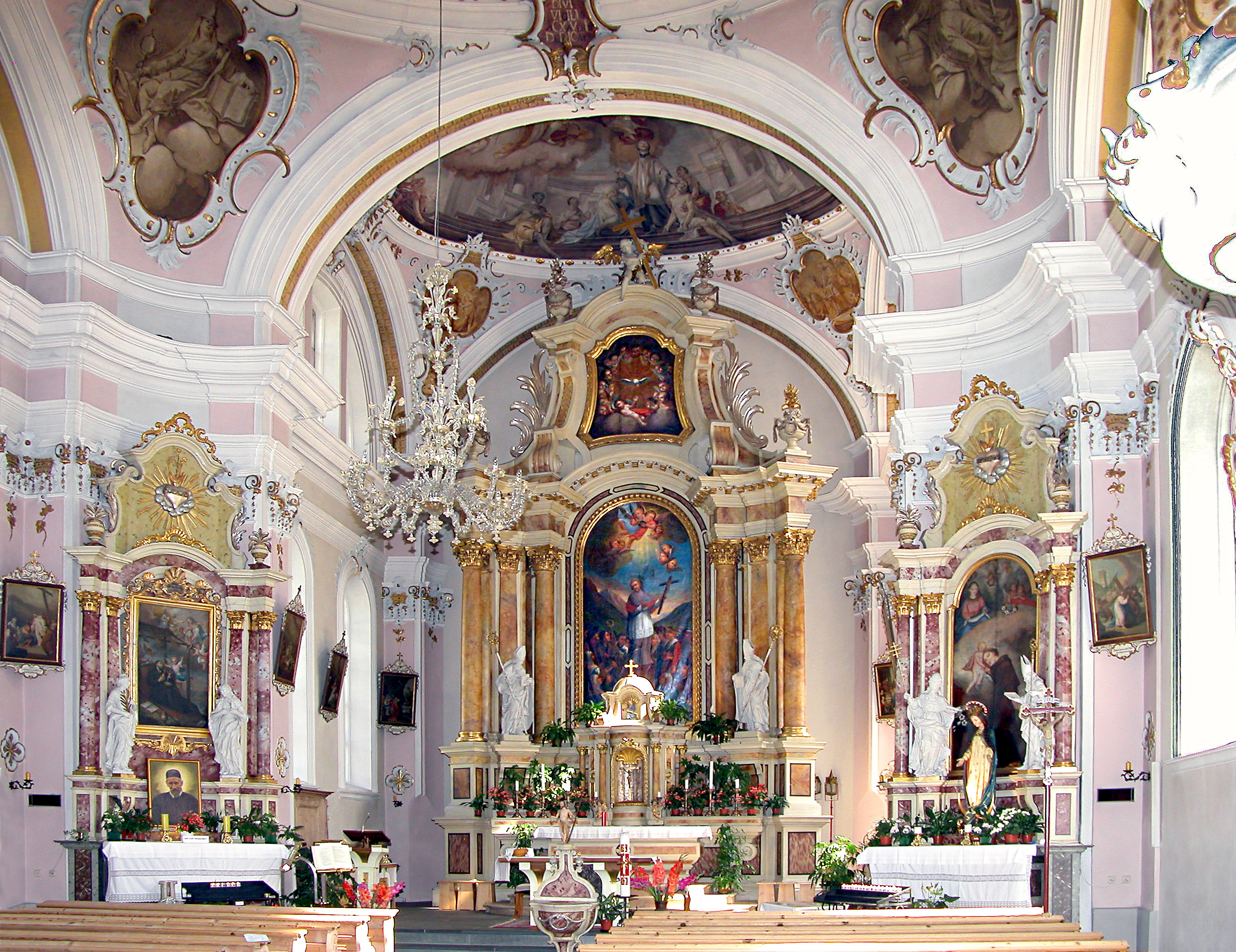 04.09.2005 St. Vigil (Enneberg) {Marebbe-San Vigilo / Al Plan de Mareo} (Italien, Südtirol, Dolomiten): Pfarrkirche St. Vigil (GMP: 46.698065,11.931370), Str. Catarina Lanz. Heutiger Bau Spätbarock, 1781/82. Fresken von Matthäus Günther. [DSCN7593.JPG]20050904085DR.JPG(c)Blobelt